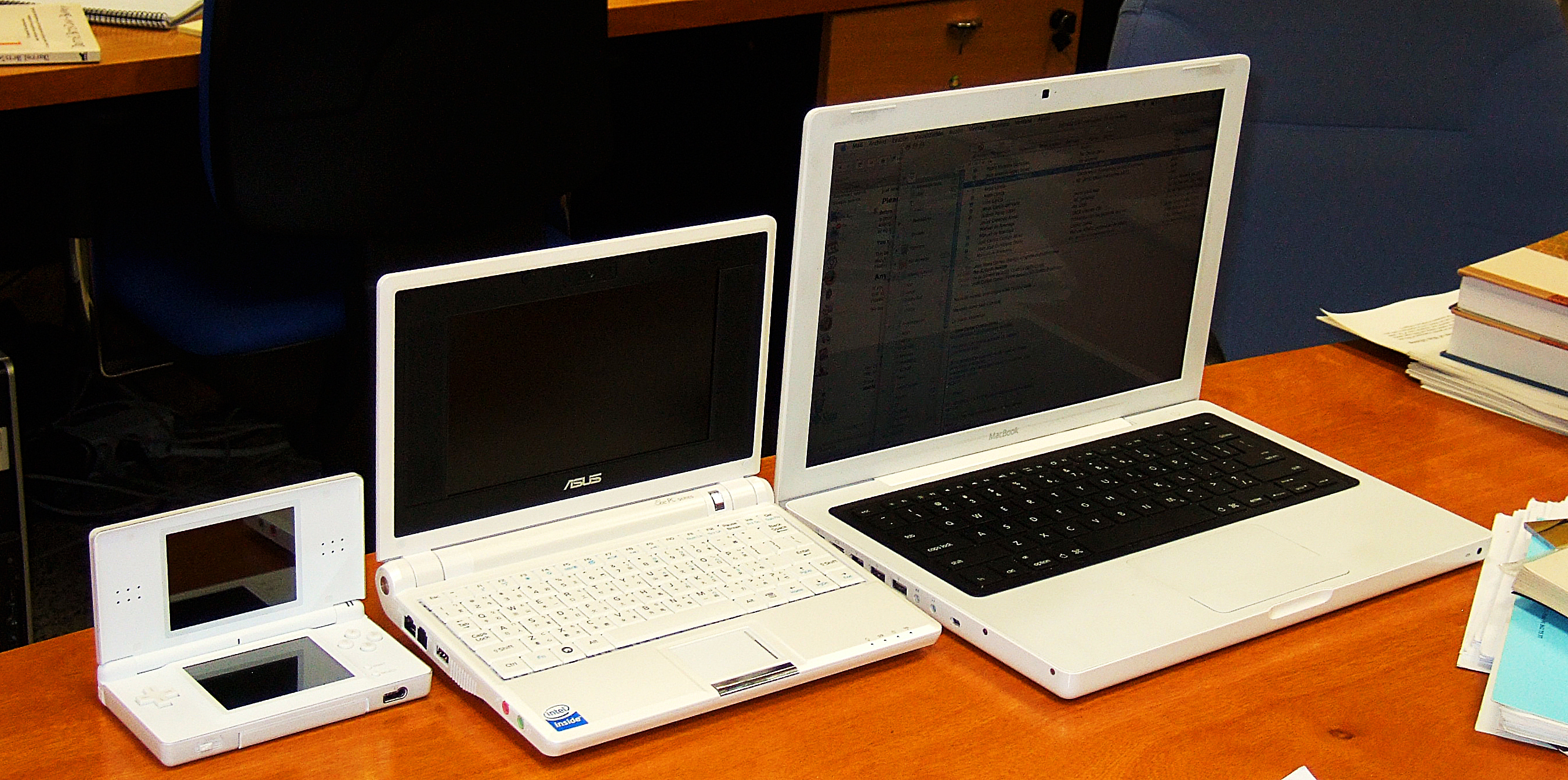 Nindendo DS - Asus EEE - Mac Book